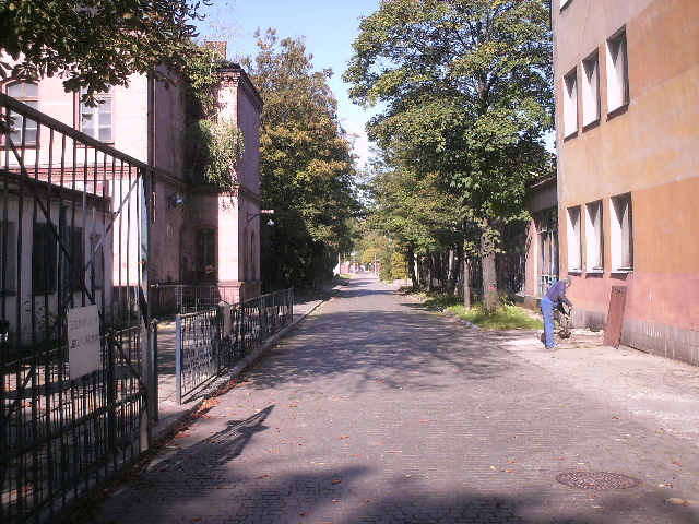 Brama od ul. Daszyńskiego widok na ul. Bolesława Śmiałego, główną ulicę koszar